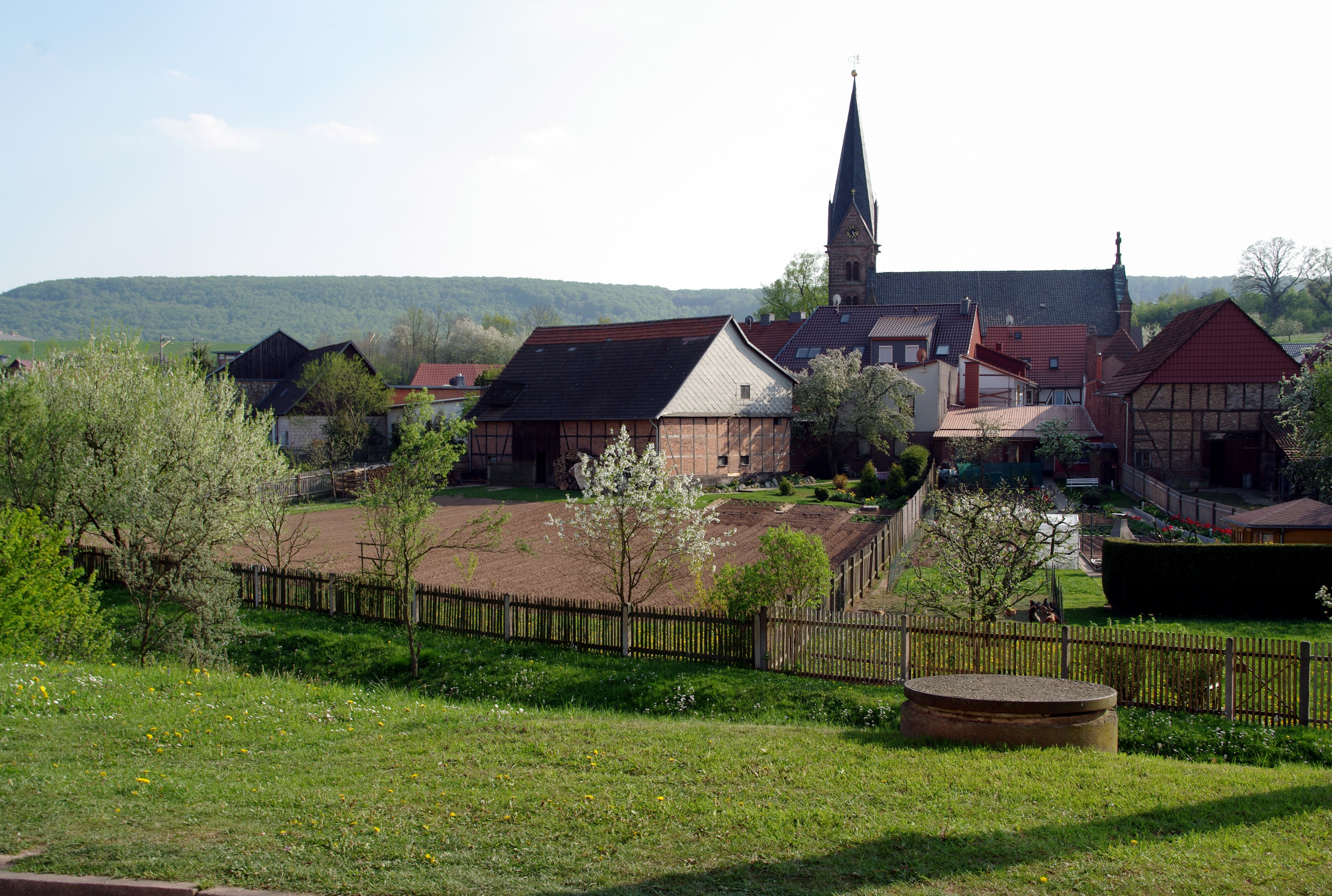 Wingerode im Landkreis Eichsfeld, Thüringen